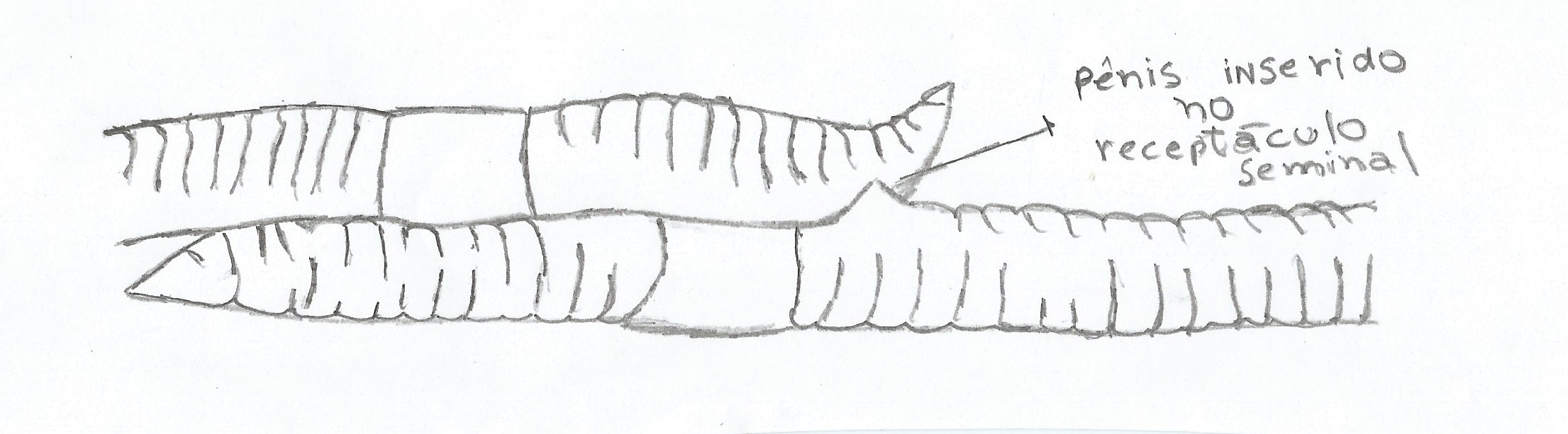 Copulação por transmissão direta de espermatozoide na minhoca Pheretima communissima